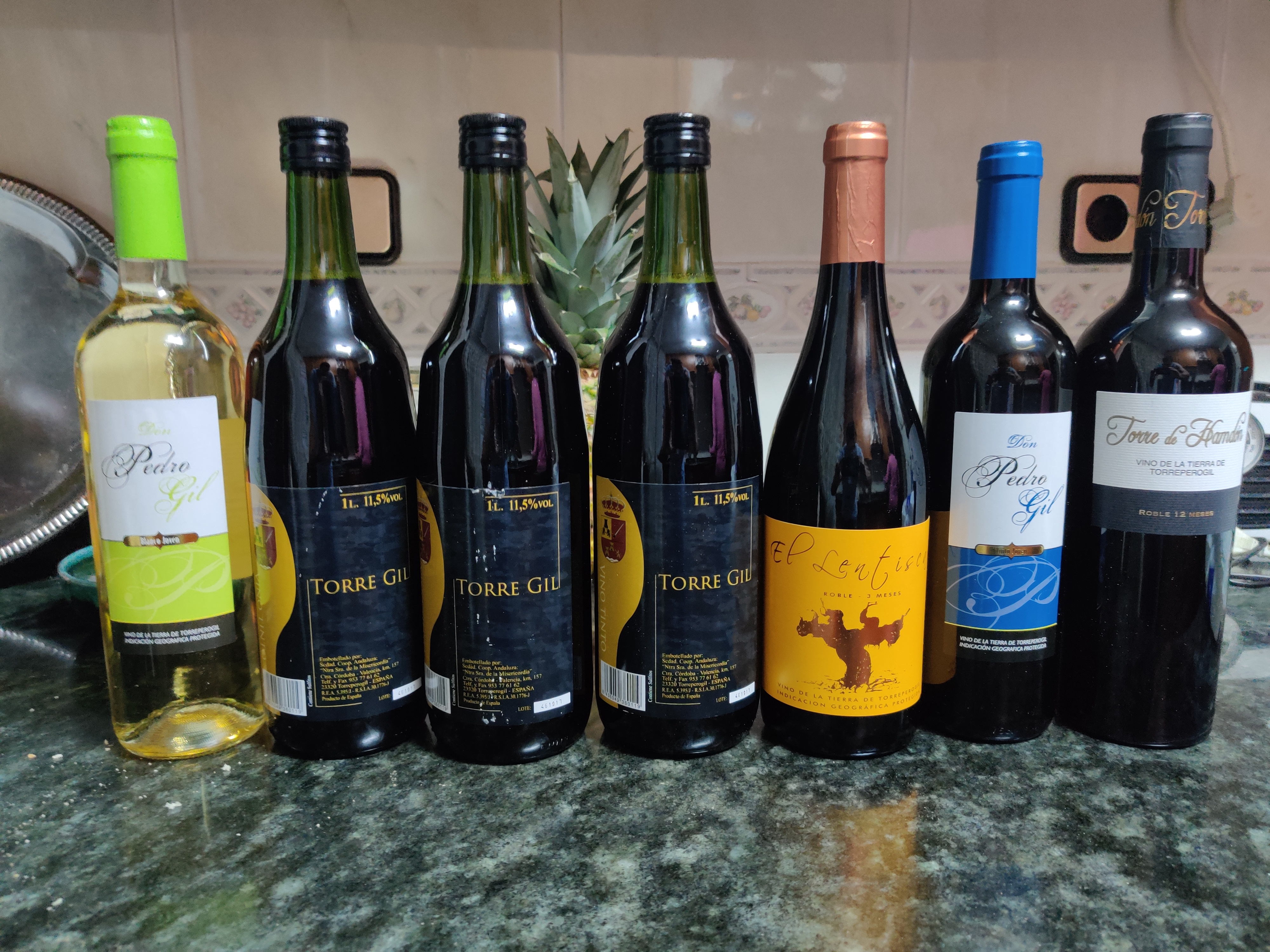 Botellas de vino (blanco, joven, criado en barrica) de la IGP Vinos de la tierra de Torreperogil.